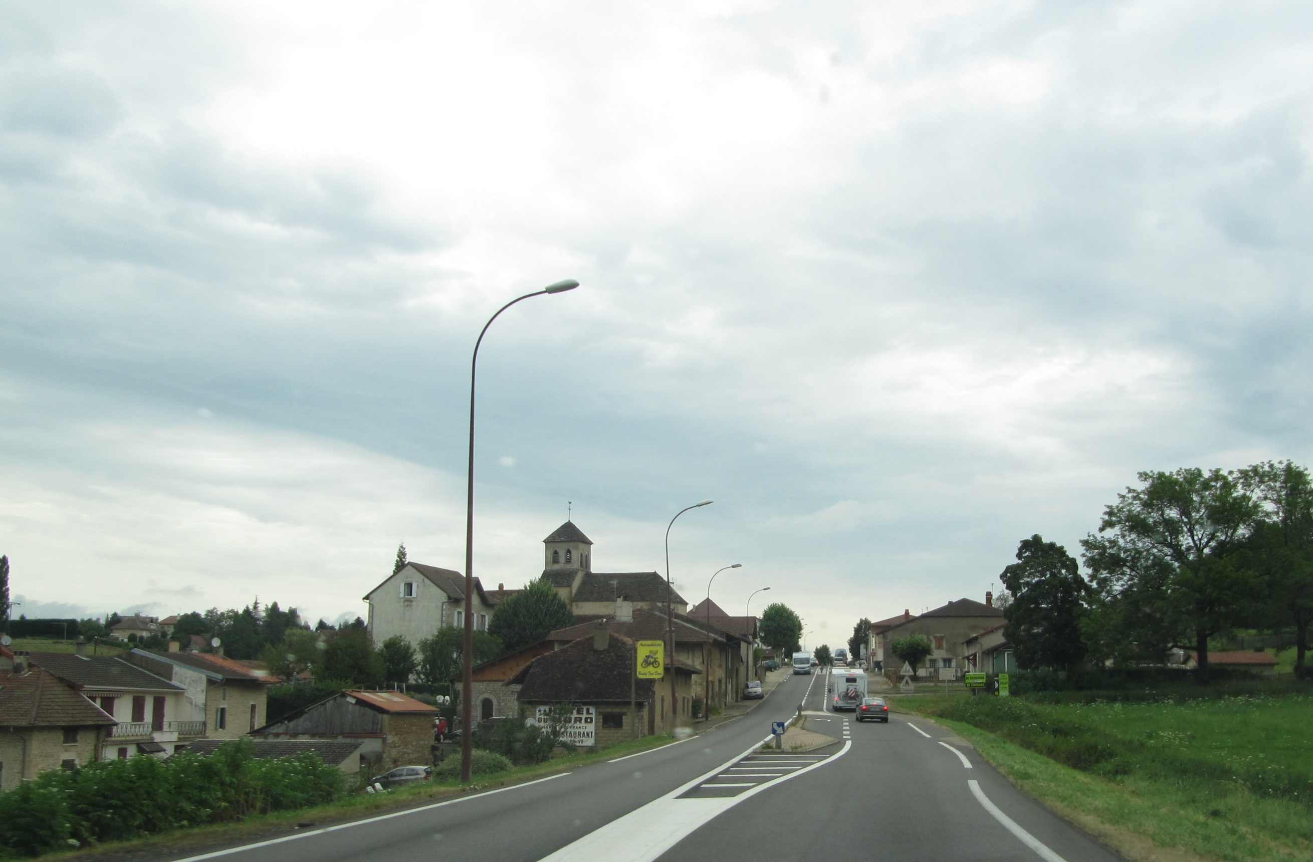 Joudes